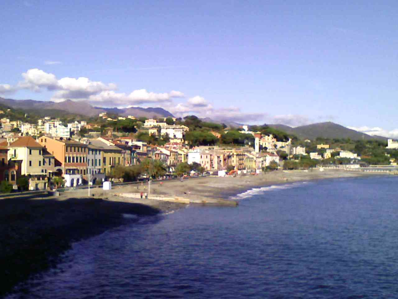 Panorama di Celle Ligure